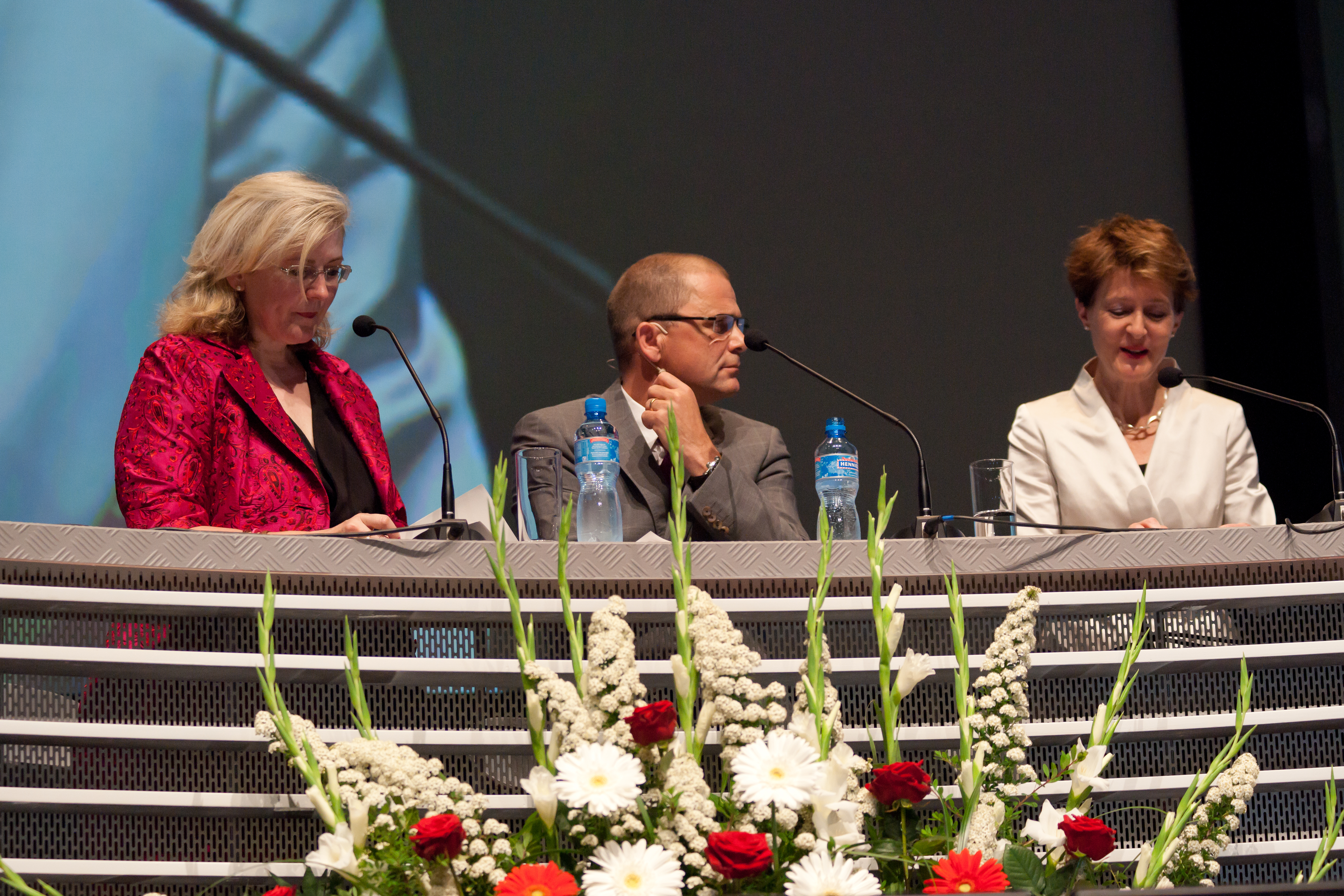 De gauche à droite : Chantal Tauxe, Alain Jeannet et Simonetta Sommaruga, au Forum des 100, en 2012.